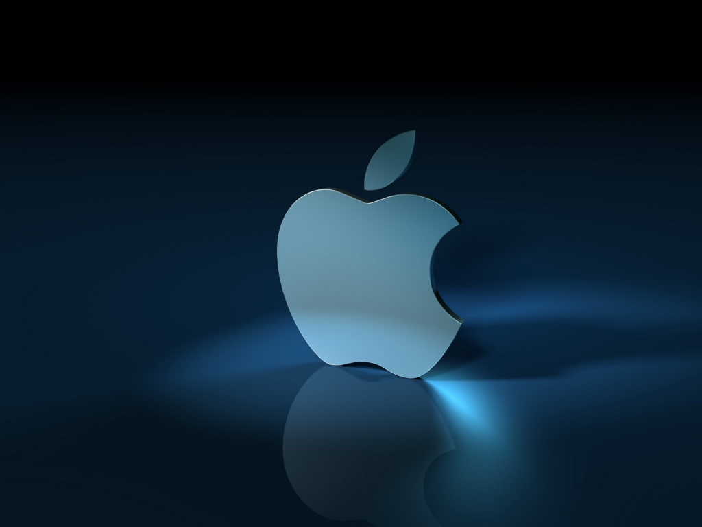 Apple Inc. (pronunciado [ˈæplˌɪŋk]) es una empresa multinacional estadounidense con sede en Cupertino, California, que diseña y produce equipos electrónicos y software.3 Entre los productos de hardware más conocidos de la empresa se cuenta con equipos Macintosh, el iPod, el iPhone y el iPad. Entre el software de Apple se encuentran el sistema operativo Mac OS X, el sistema operativo iOS, el explorador de contenido multimedia iTunes, la suite iLife (software de creatividad y multimedia), la suite iWork (software de productividad), Final Cut Studio (una suite de edición de vídeo profesional), Logic Studio (software para edición de audio en pistas de audio), Xsan (software para el intercambio de datos entre servidores), Aperture (software para editar imágenes RAW), y el navegador web Safari. La empresa opera más de 370 tiendas propias en nueve países,[cita requerida] miles de distribuidores (destacándose los distribuidores premium o Apple Premium Resellers) y una tienda en línea (disponible en varios países) donde se venden sus productos y se presta asistencia técnica. Las acciones en conjunto de Apple Inc. valen USD 574.637 millones, siendo así la más grande del mundo.4